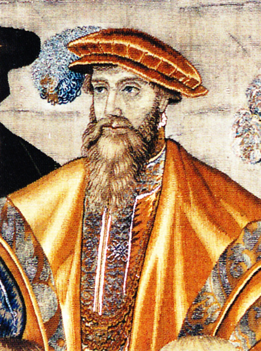 Wirkerei von Herzog Philipp I. von Pommern, Ausschnitt aus dem Croy-Teppich